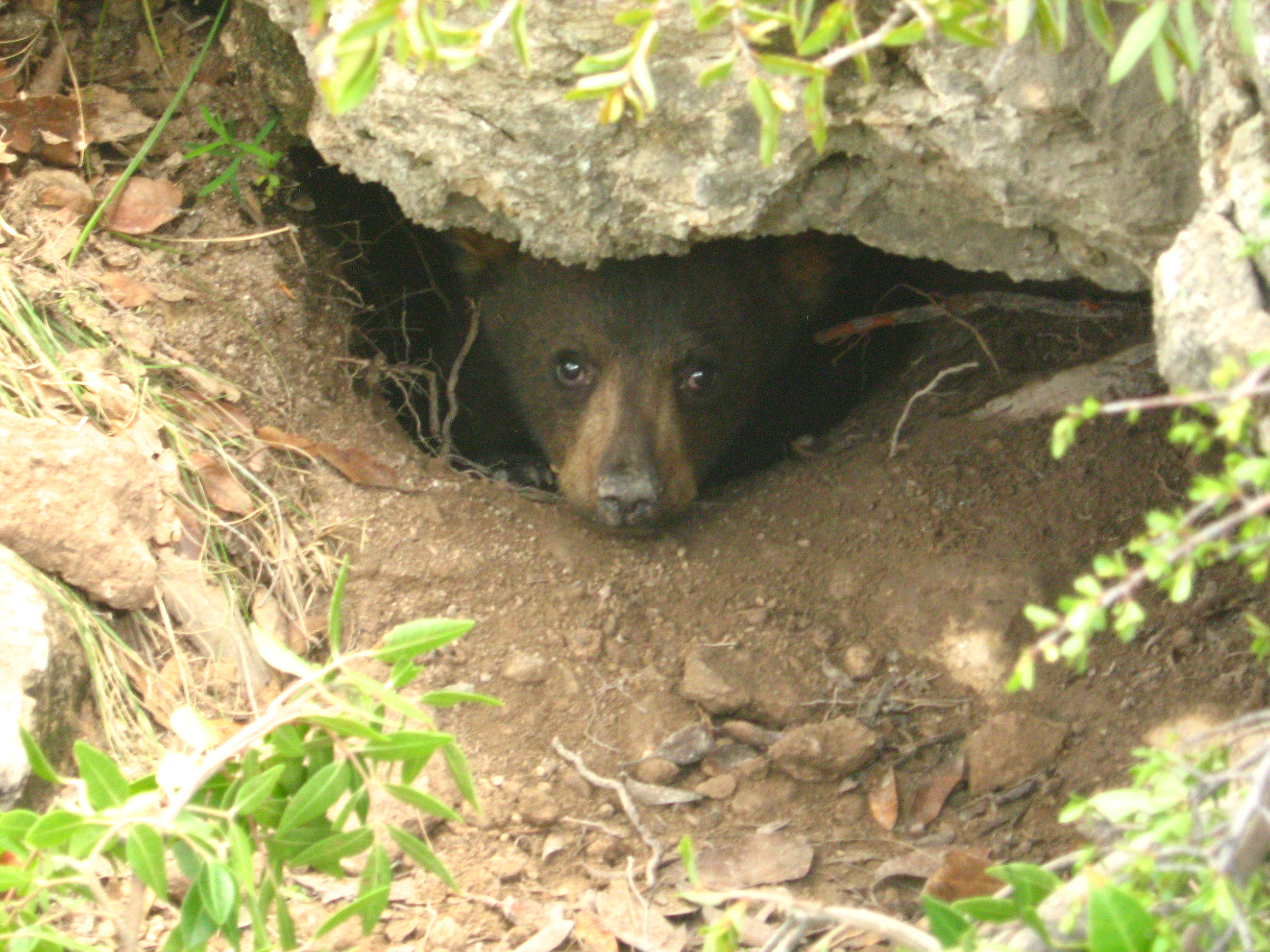 Cachorro de oso negro (Ursus americanus) en Cañón de San Lorenzo.